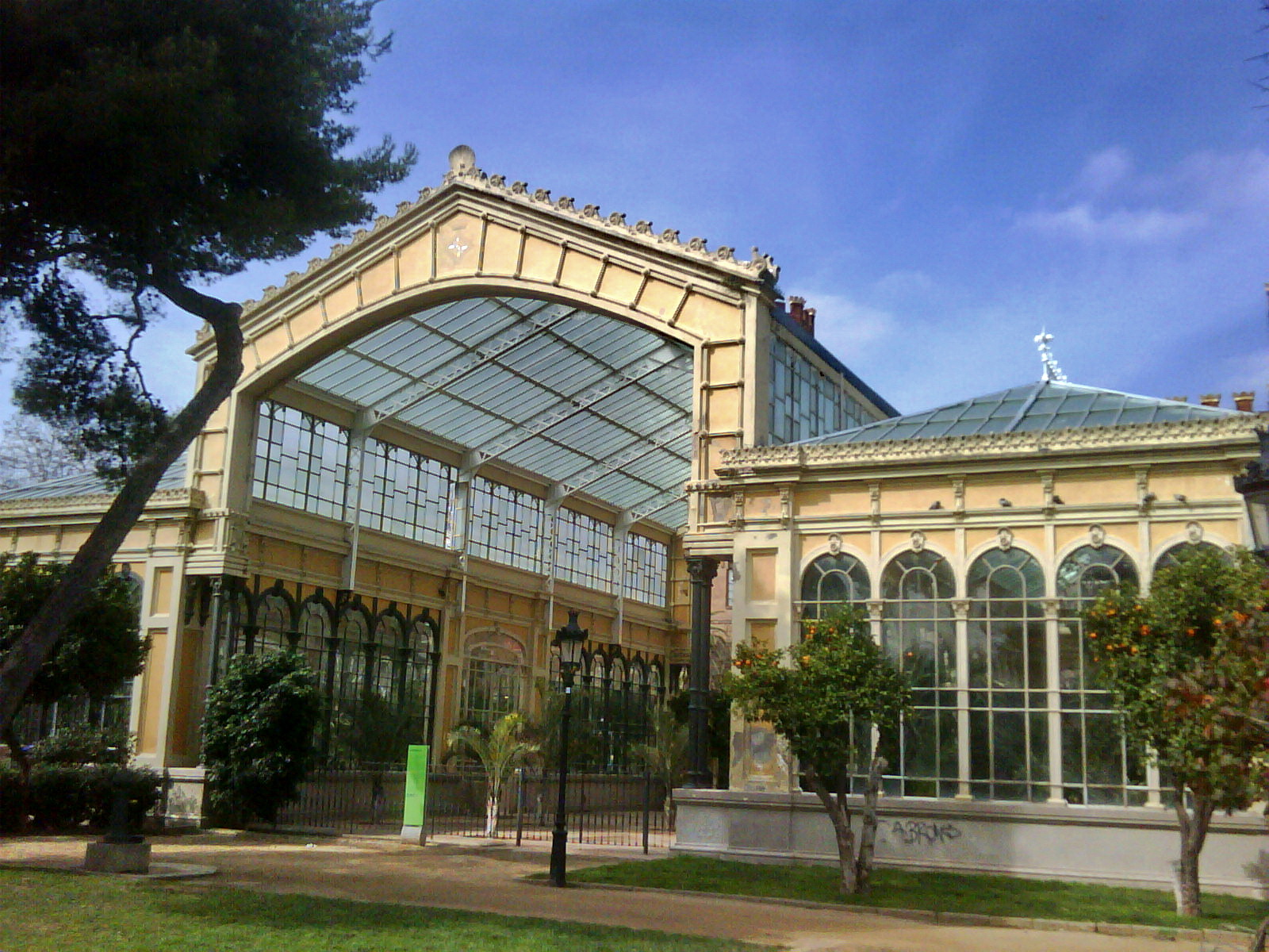 Hivernacle al parc de la Ciutadella (Barcelona, Catalunya), obra de Josep Amargós i Samaranch de 1884.